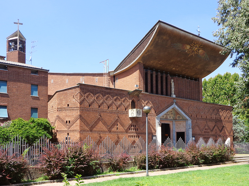 Milano, chiesa parrocchiale di San Giovanni Battista alla Creta. Fu costruita dal 1956 al 1958 su progetto di Giovanni Muzio.